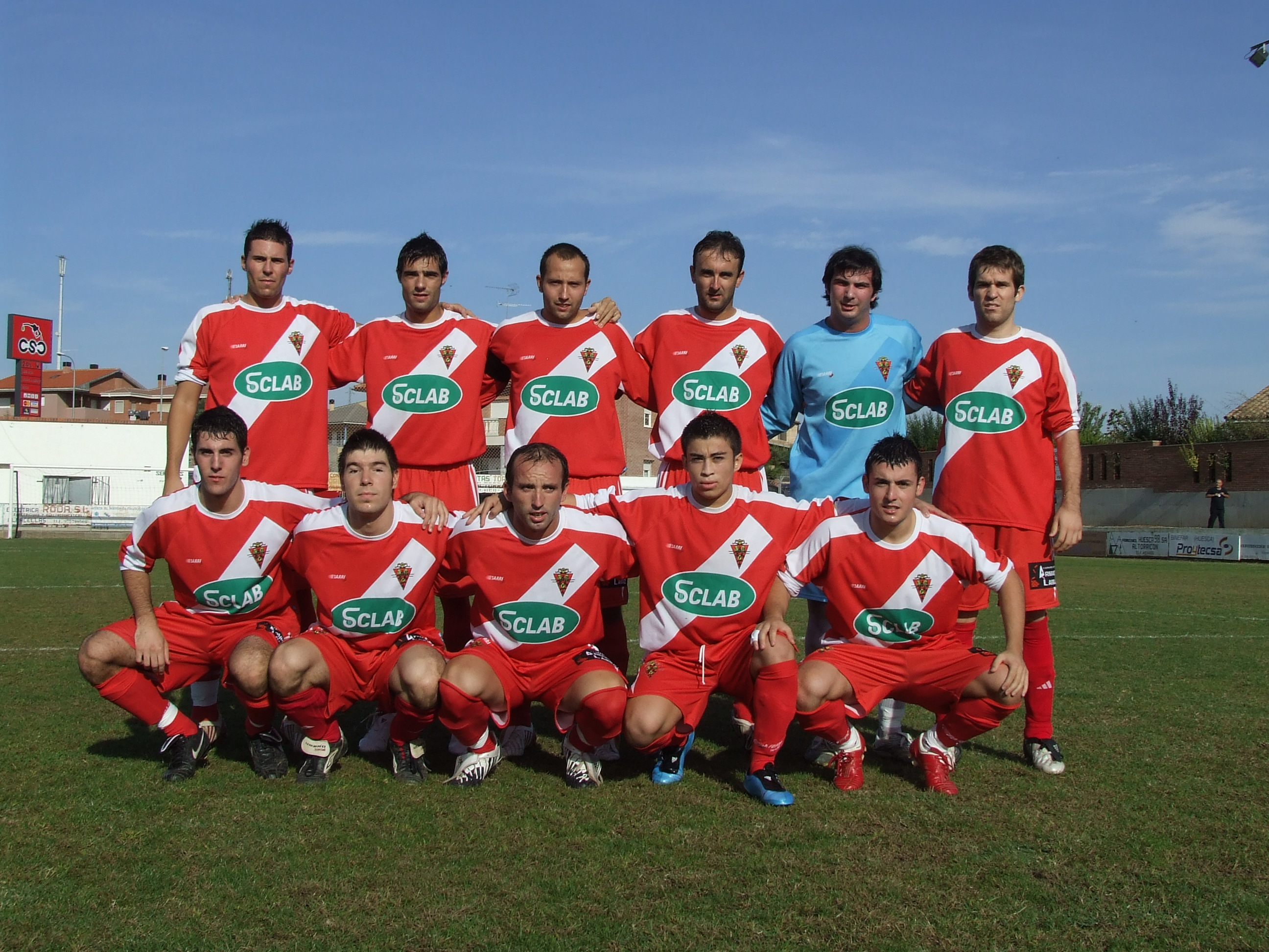 Altorricón 2 - Pomar 1 (04.10.2009)